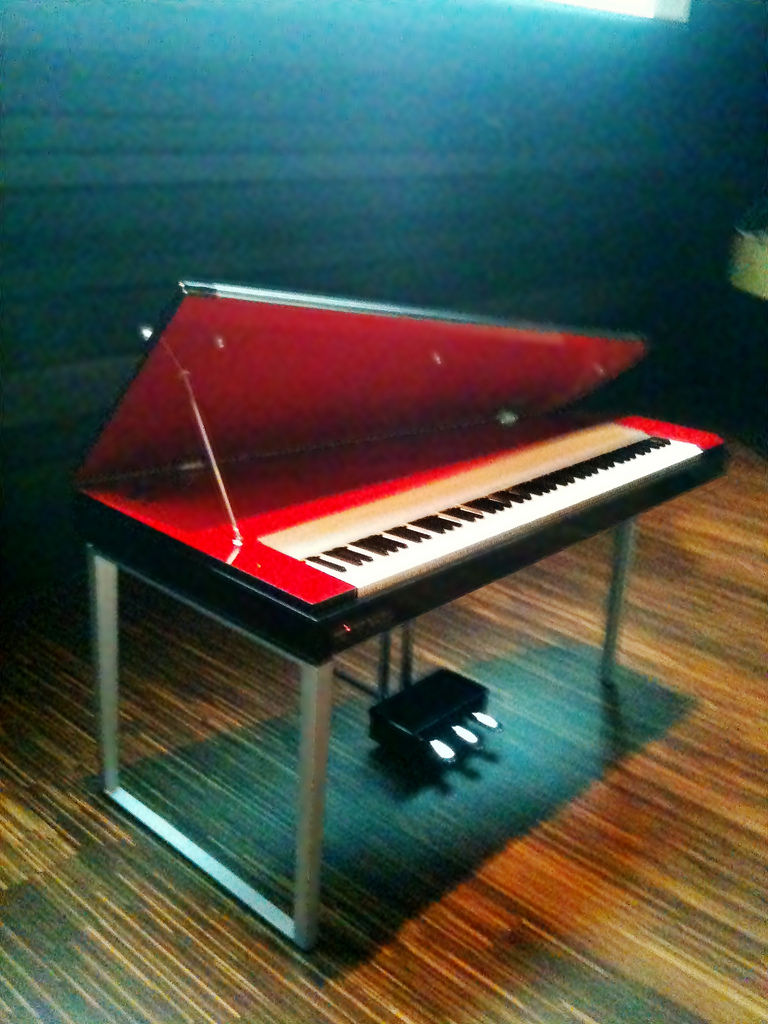 YAMAHA MODUS H01 Digital Piano 15. MODUS H01, Yamaha Design Masterworks